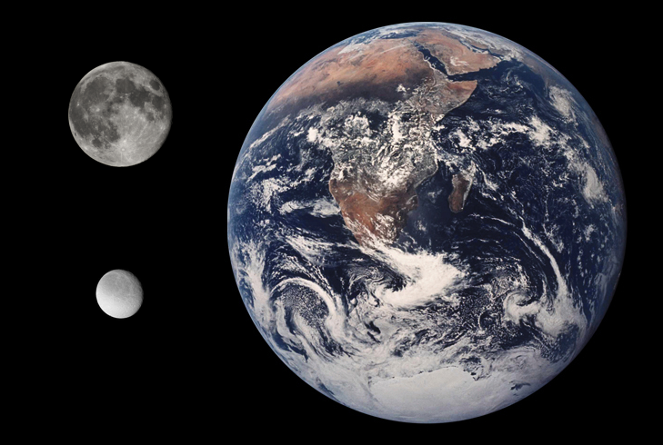 Comparacion de Rea, la Luna y la Tierra Diameter comparison of Saturn's moon Rhea, the Moon and Earth Scale approx. 29km per px.